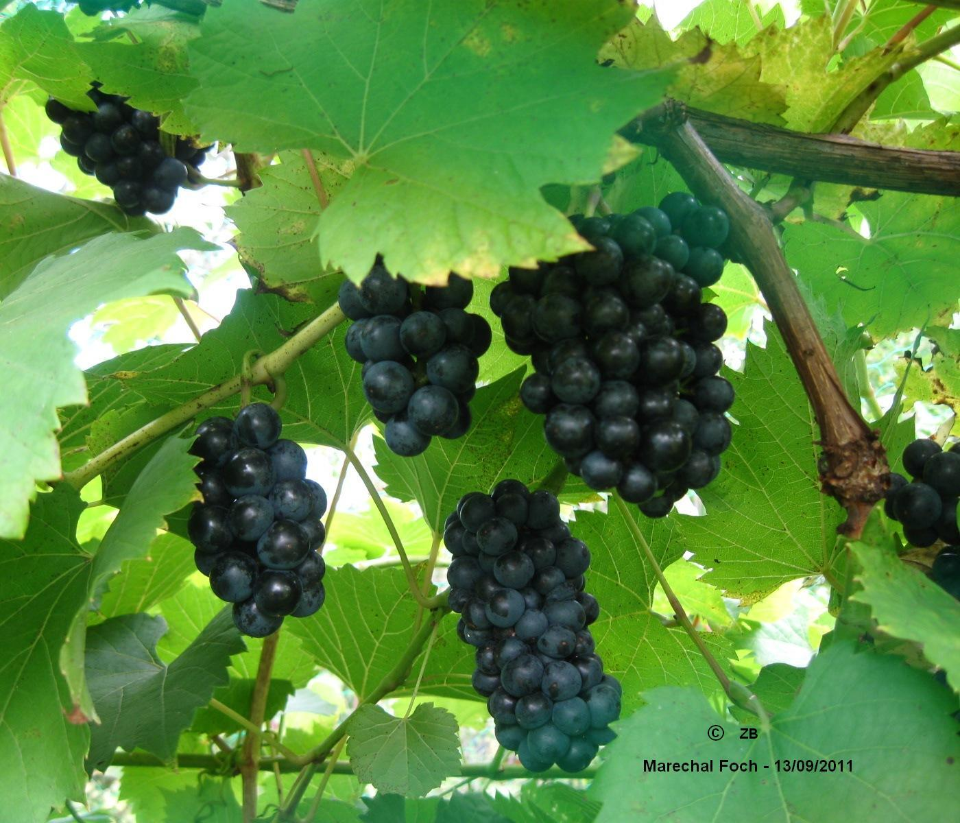 Marechal Foch - grona 13/09/2011